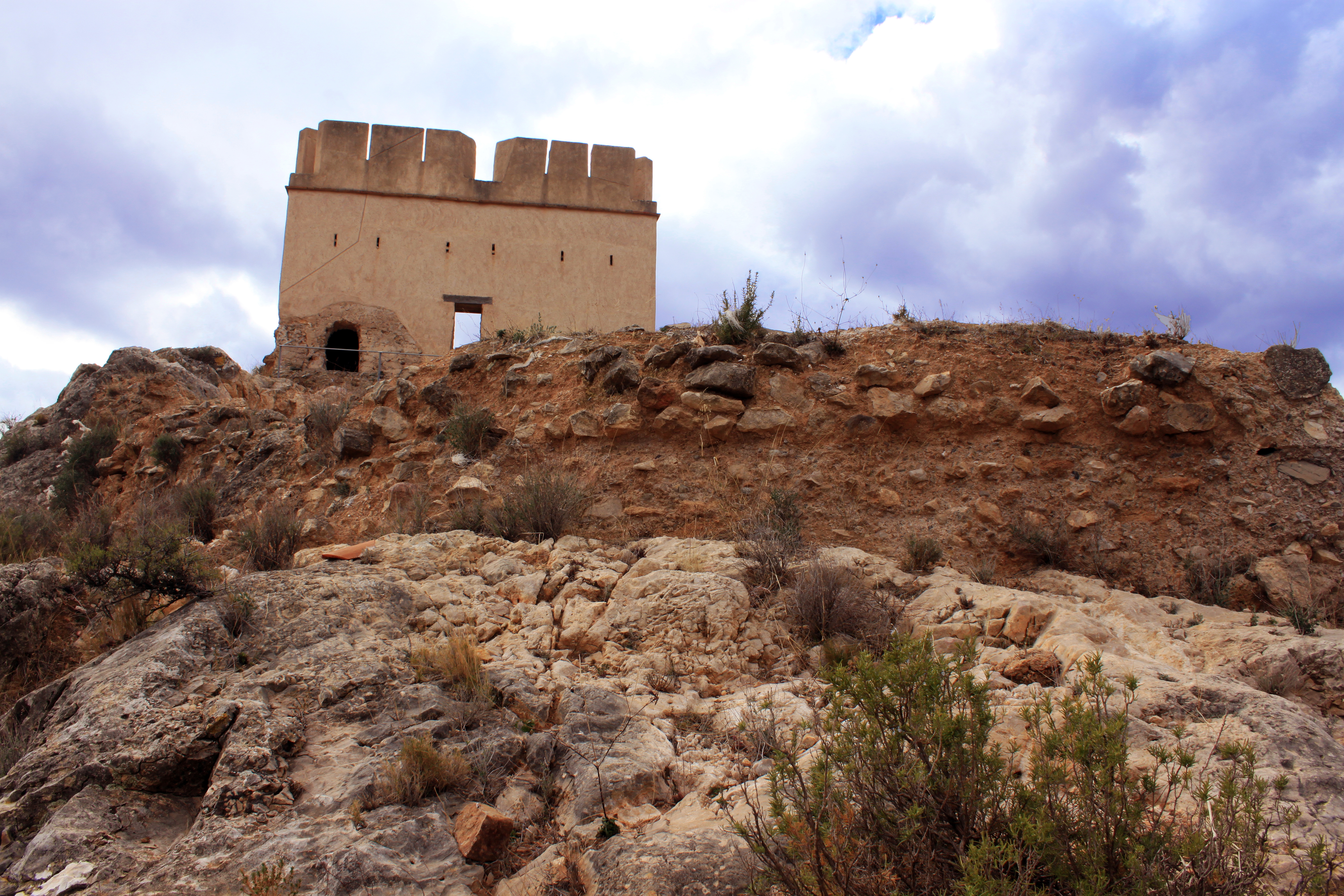 La Torrecilla, antigua torre defensiva islámica construída sobre un poblado romano en la localidad de Chelva, provincia de Valencia, Comunidad valenciana.